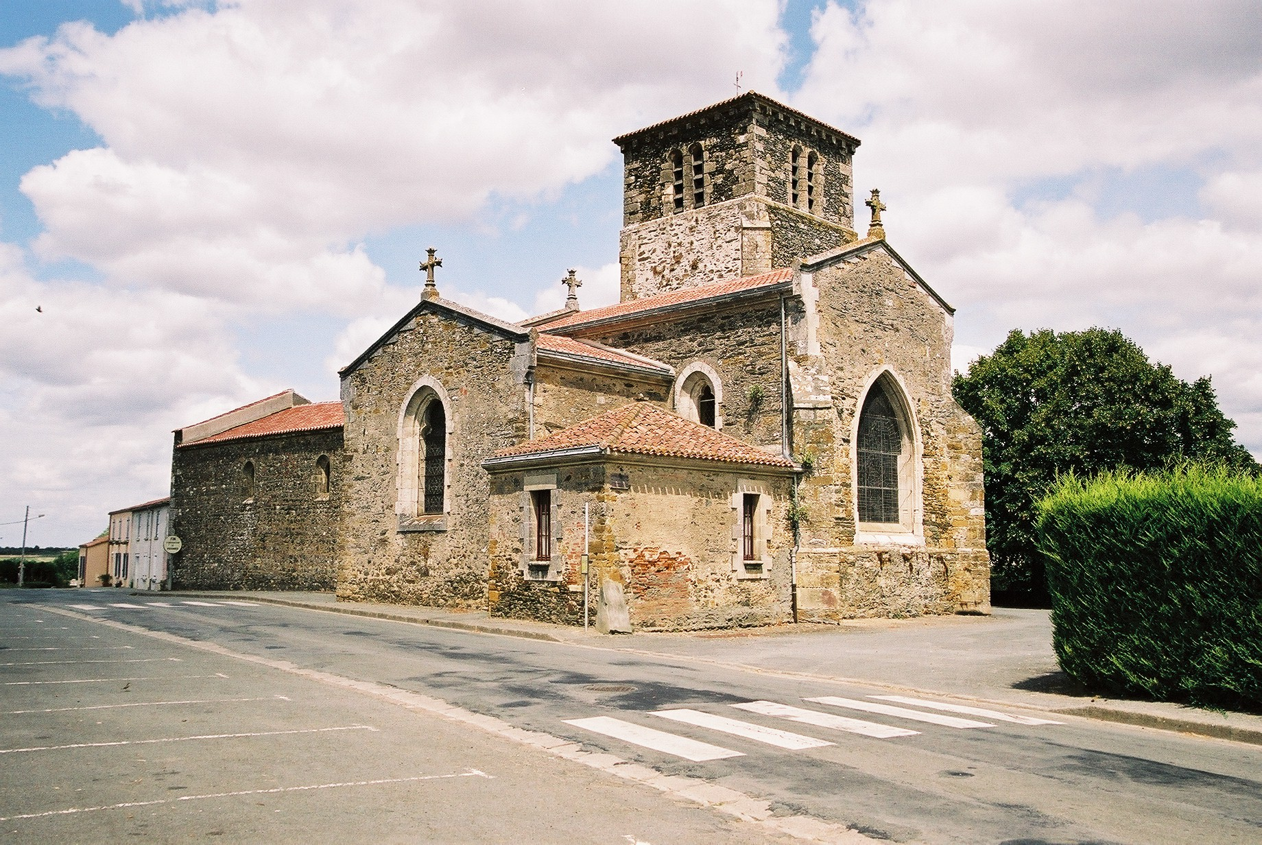 place du village